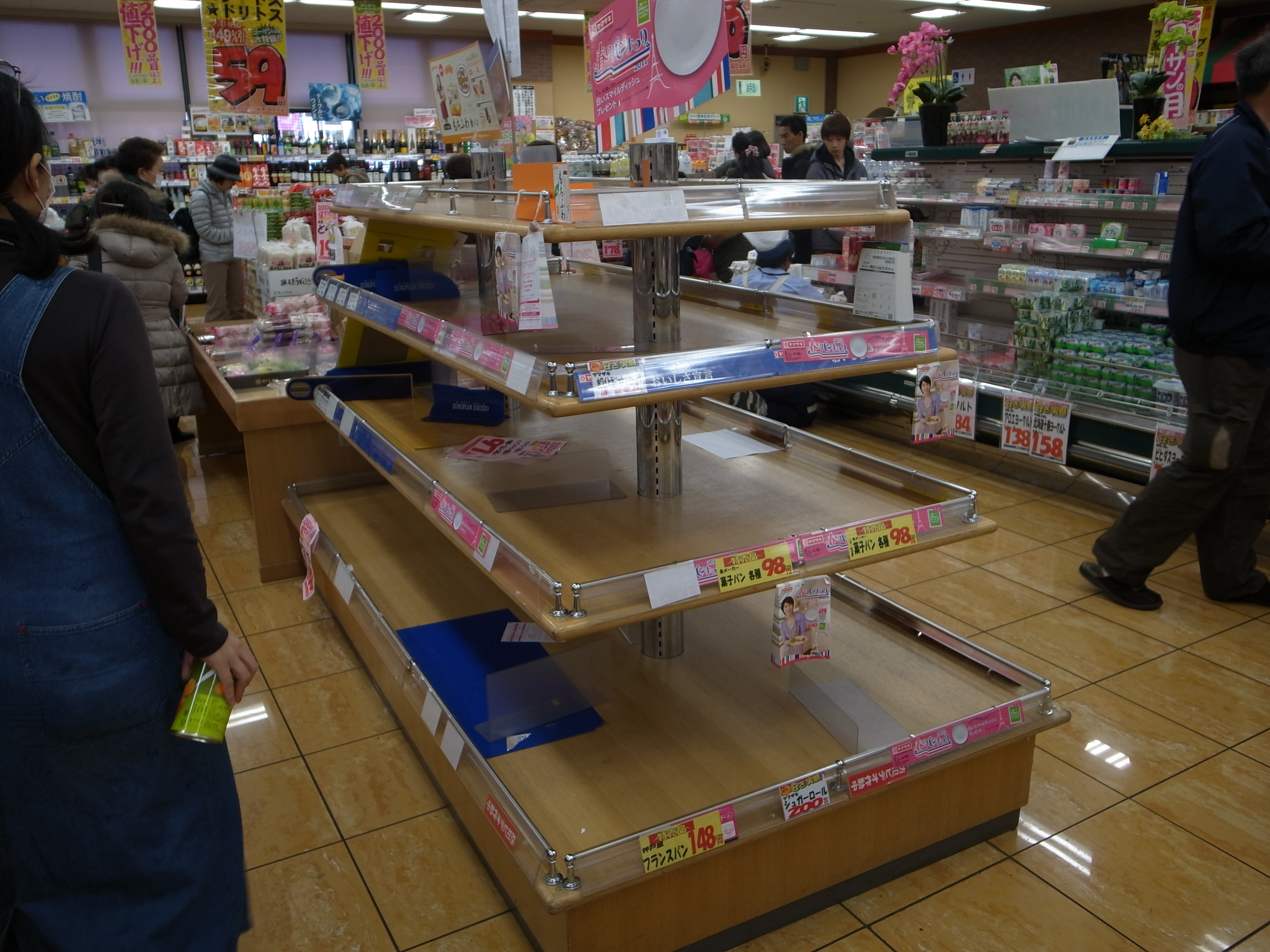 Exif_JPEG_PICTURE ヤマザキ春のパンまつり